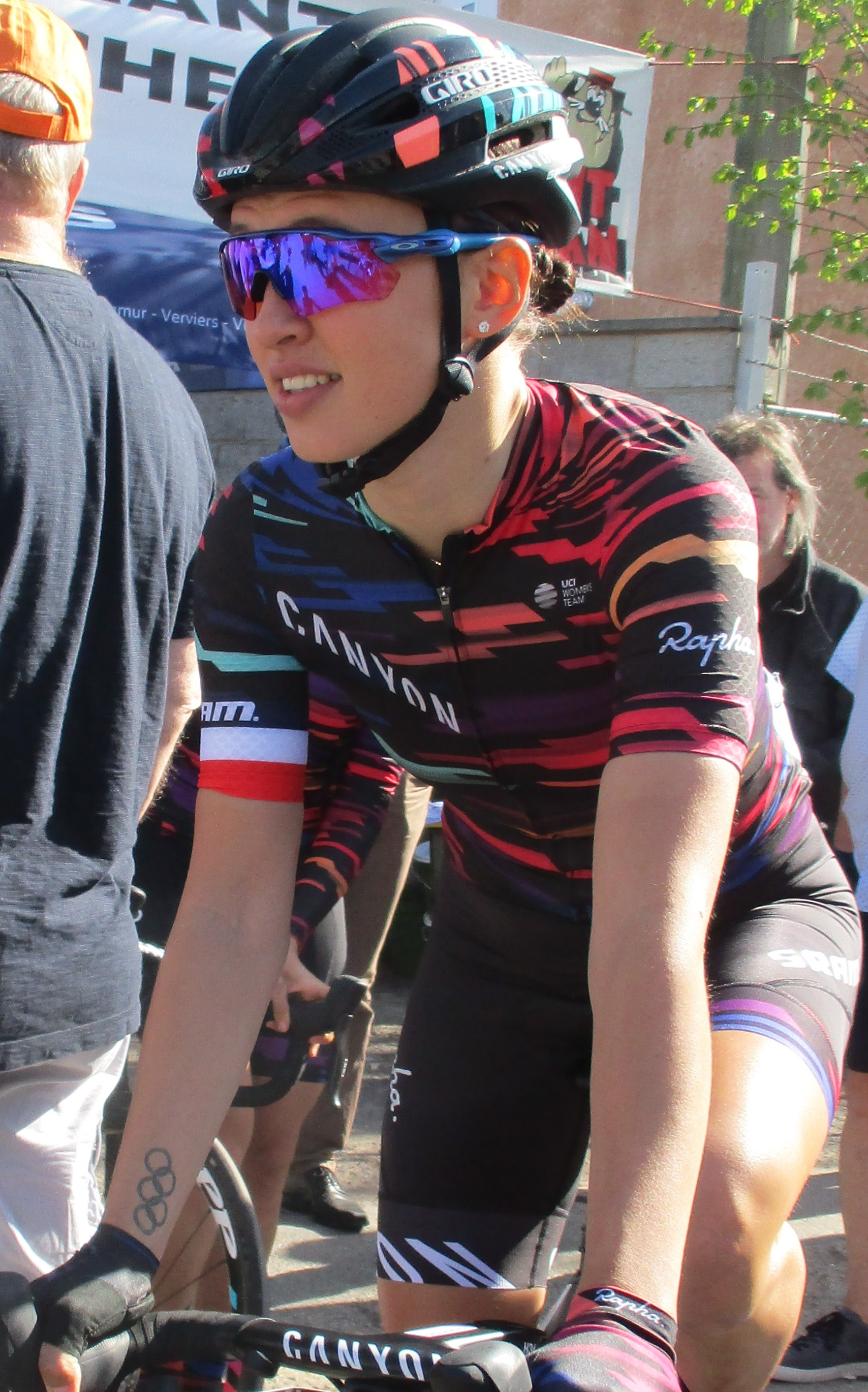 Start van de Waalse Pijl 2018 op de Mur van Huy.